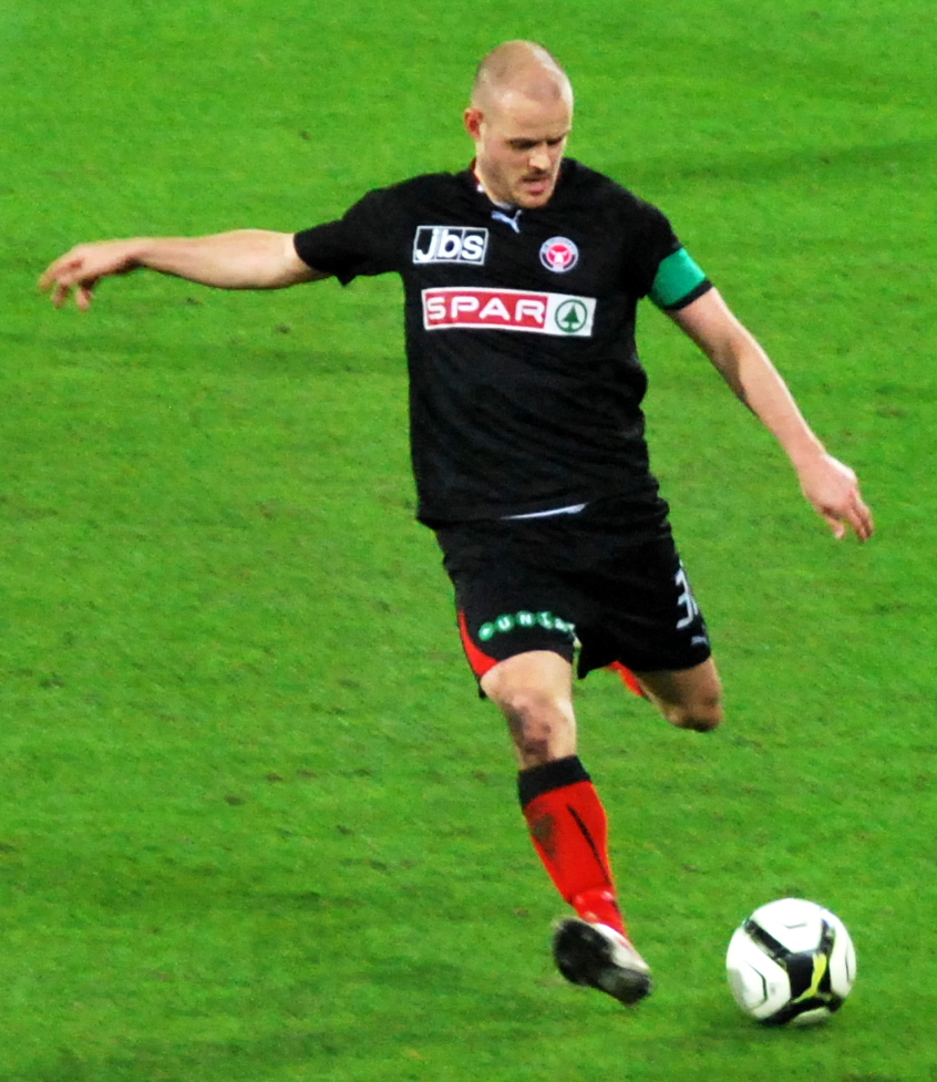 Fodboldspilleren Kristian Bak Nielsen fra FC Midtjylland. Her i en superligakamp mod AC Horsens på MCH Arena i Herning.